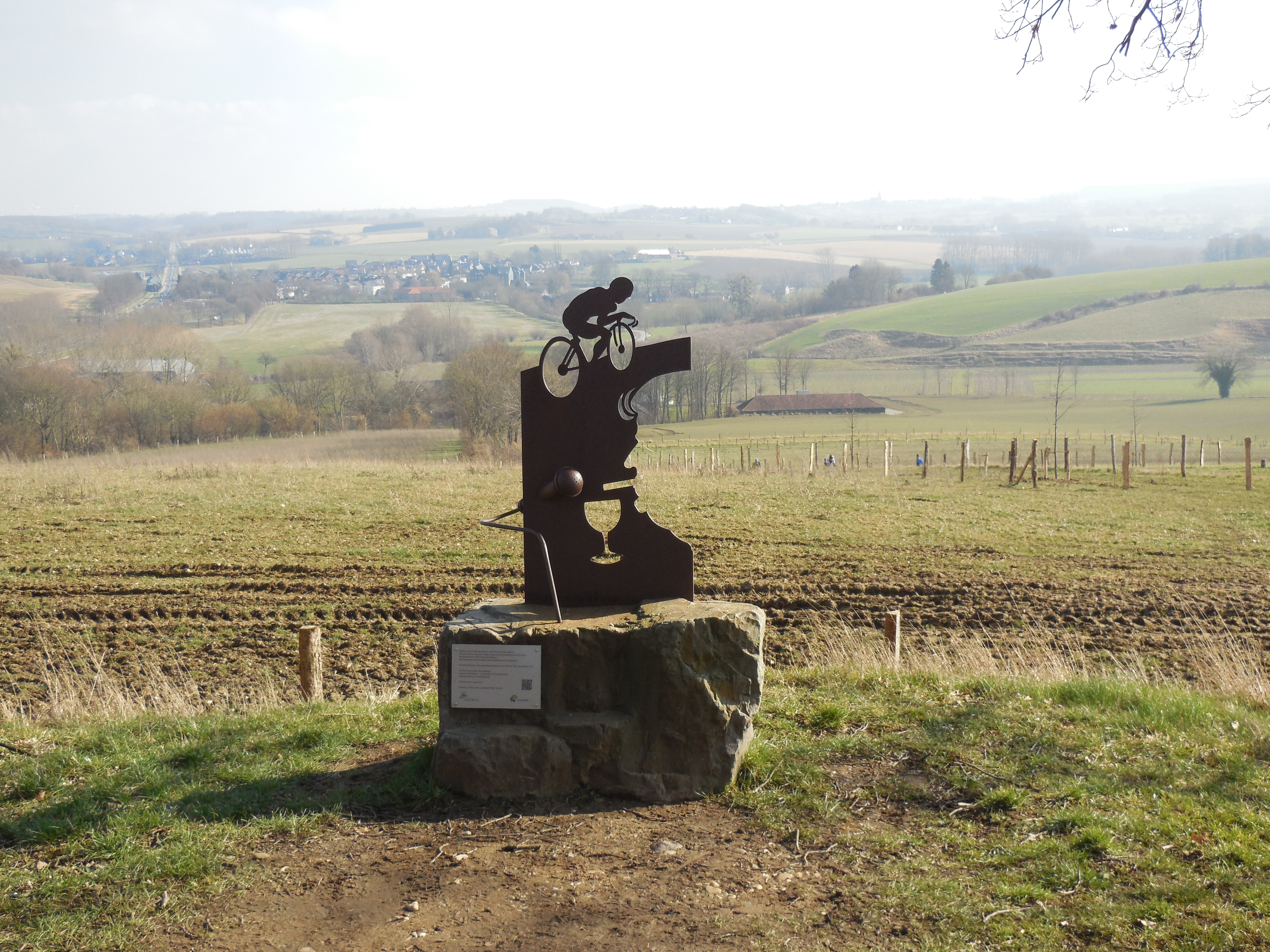 Gedenkteken Jean Nelissen boven op de Gulperberg